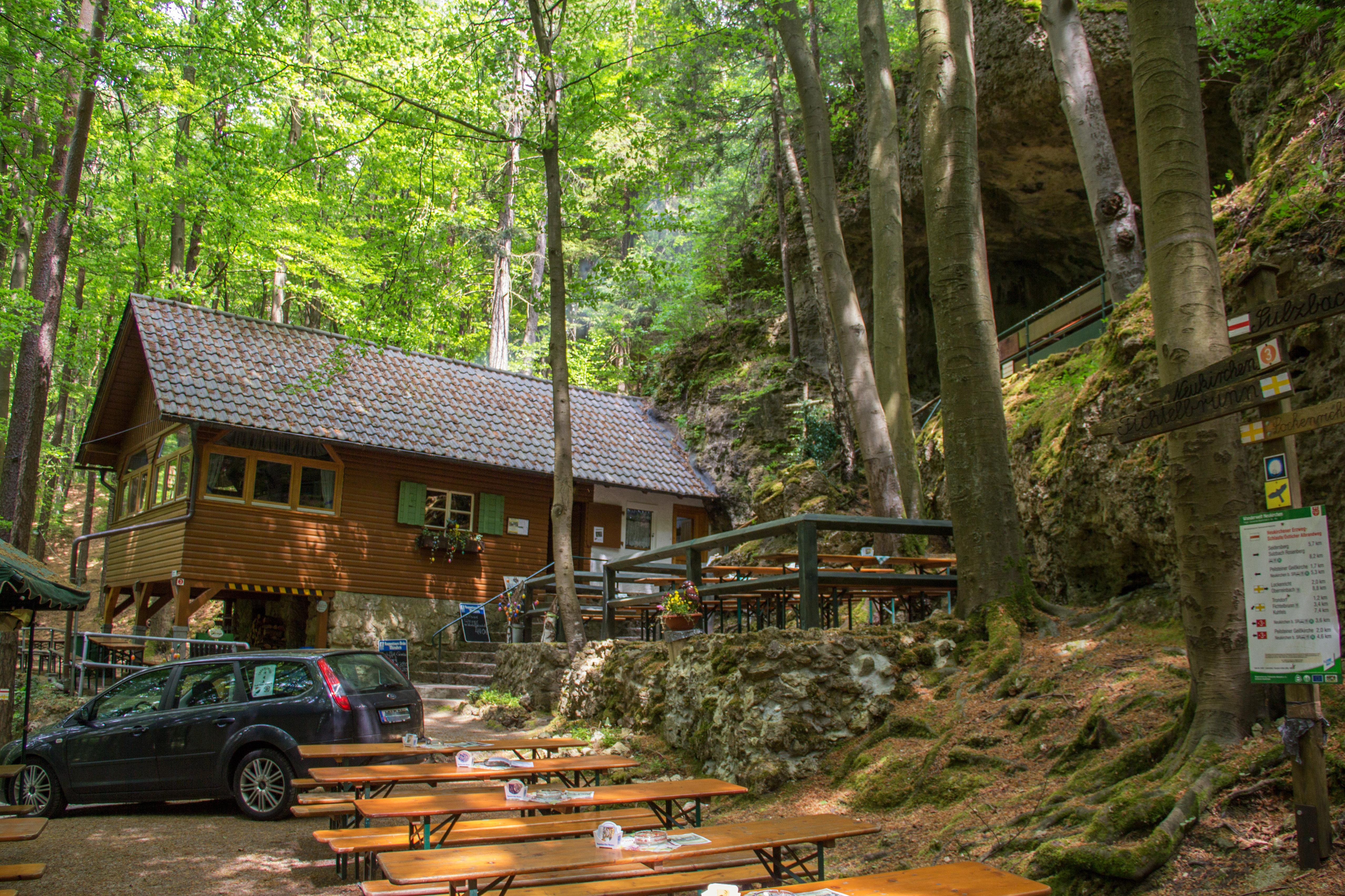 Osterhöhle, Wirtshütte, Neukirchen bei Sulzbach-Rosenberg, Karsthöhle, Schauhöhle, Geotop, Bodendenkmal